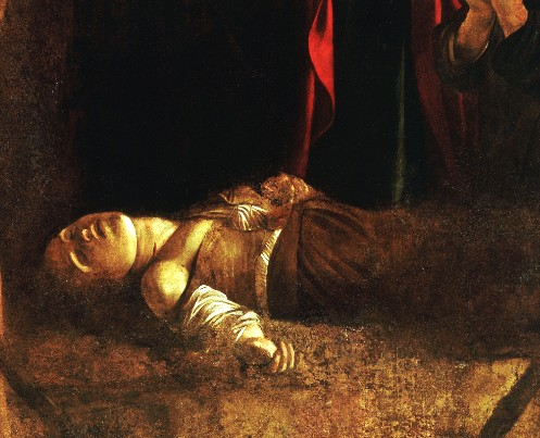 Particolare del dipinto de Il Seppellimento di Santa Lucia" (la Santa interpretata da Caravaggio)